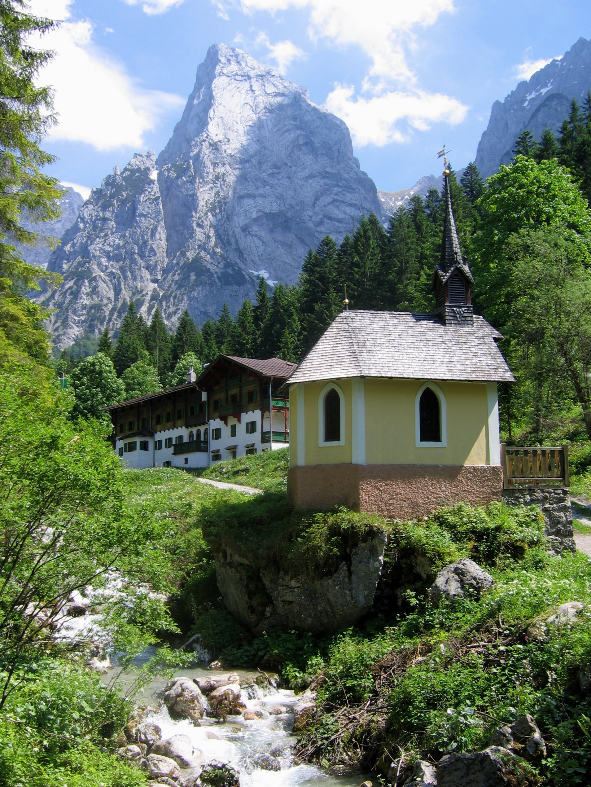 Kapelle mit Anton-Karg-Haus, Kaisergebirge This media shows the remarkable cultural object in the Austrian state of Tyrol listed by the Tyrolean Art Cadastre with the ID 19231. (on tirisMaps, pdf, more images on Commons, Wikidata)